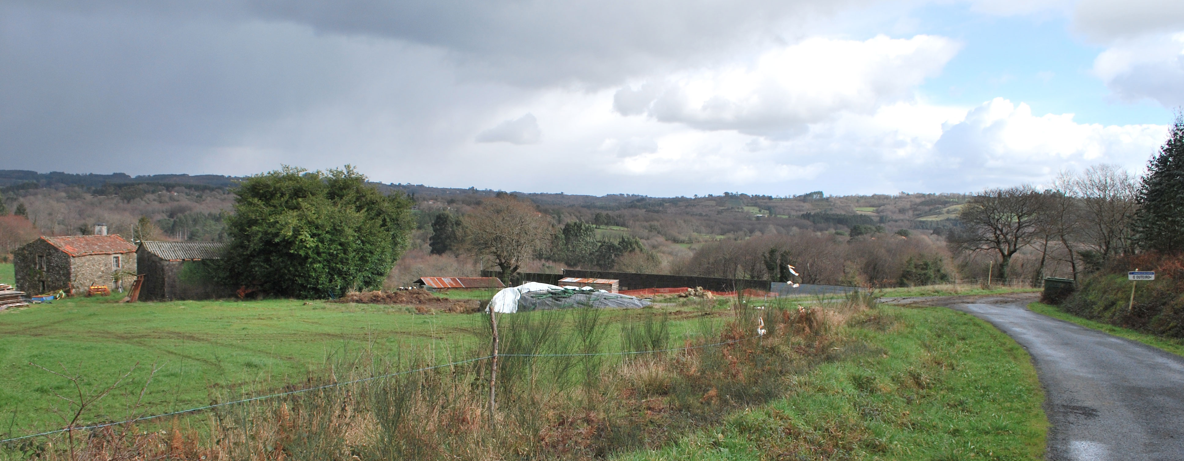 Vista do Outeiro en Fisteus Curtis A Coruña Galiza Spain